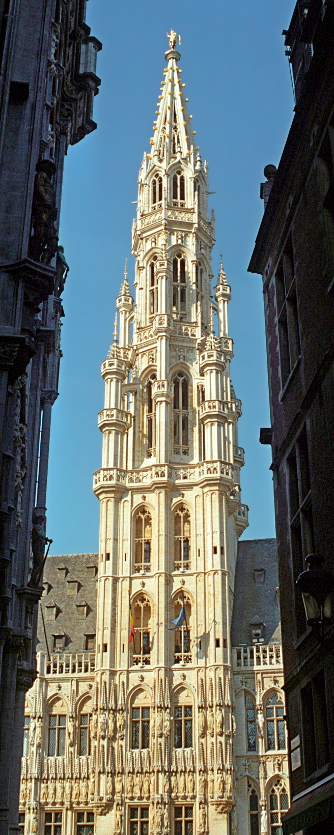 Belgique - Bruxelles - Hôtel de ville de Bruxelles - Le beffroi vu de la rue Chair et Pain